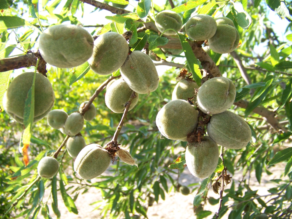 Prunus dulcis (Almendro) : Variedad Mollar - La Poya, Albatera (Alicante, España).